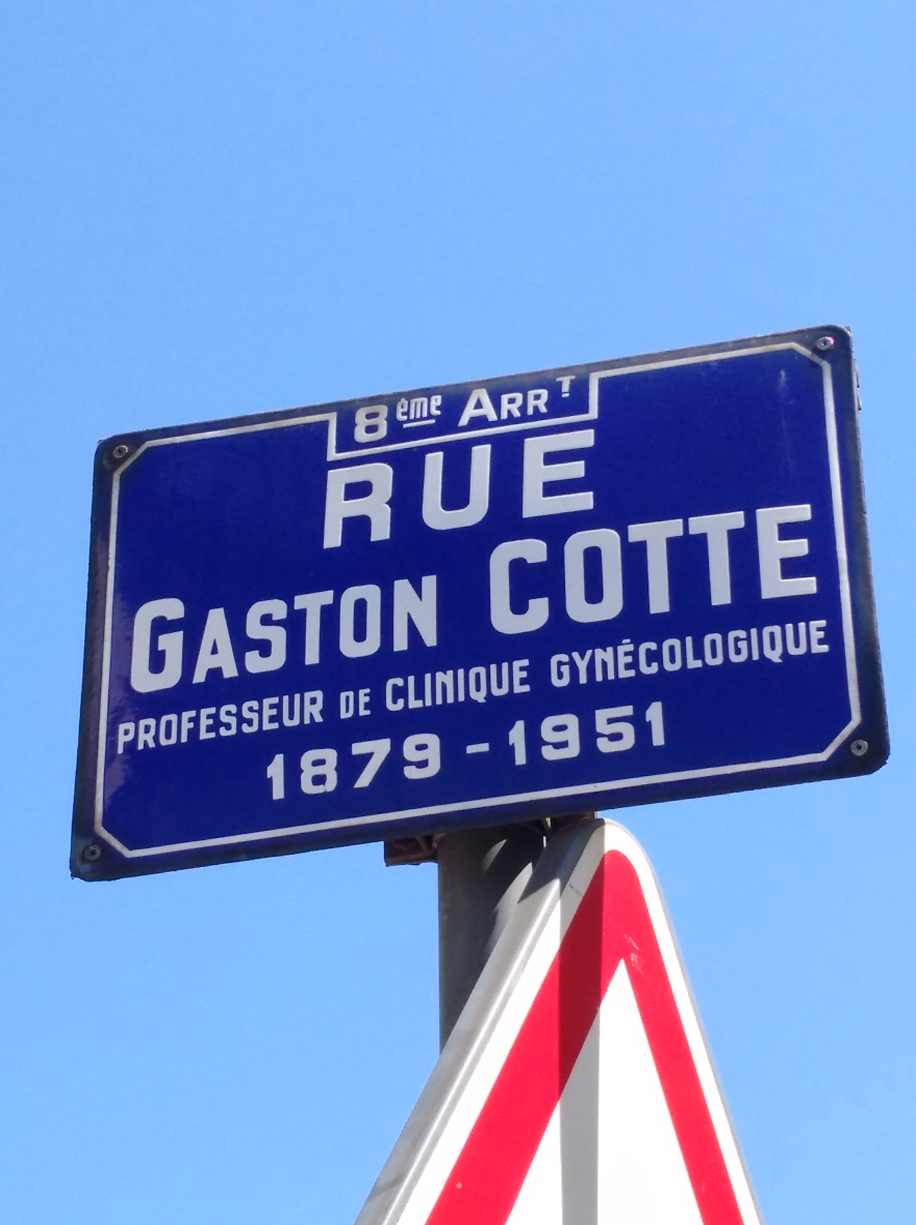 Plaque de la rue Gaston Cotte, dans le 8e arrondissement de Lyon.